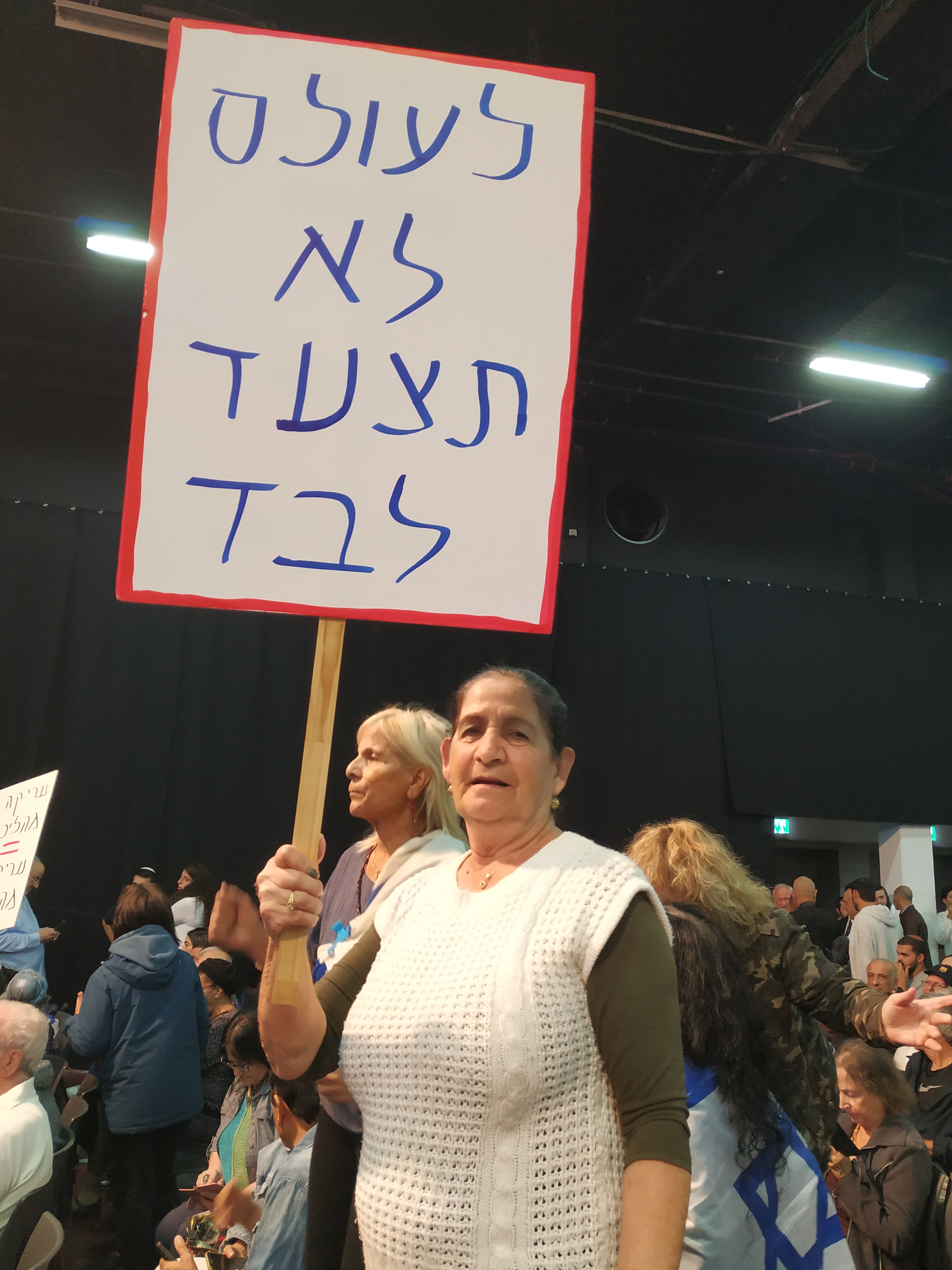 כנס החירום של הליכוד, גני התערוכה, 17 בנובמבר 2019